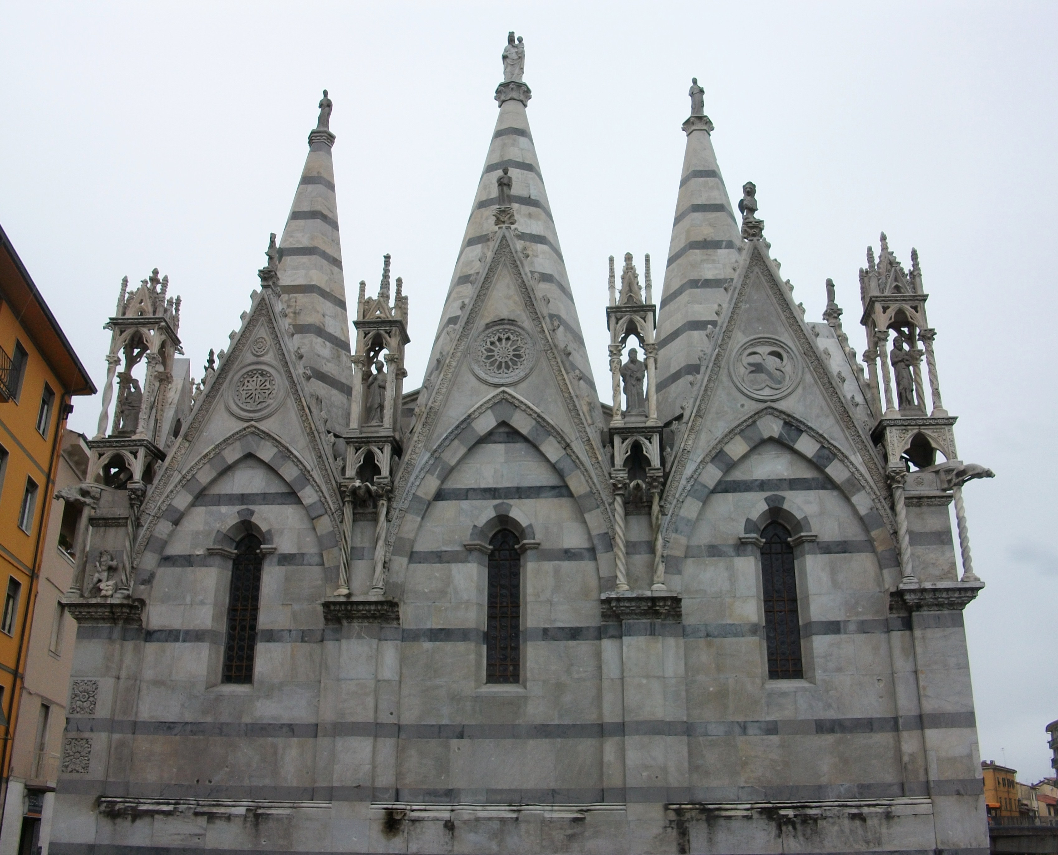 Part posterior de l'església de Santa Maria della Spina, Pisa.